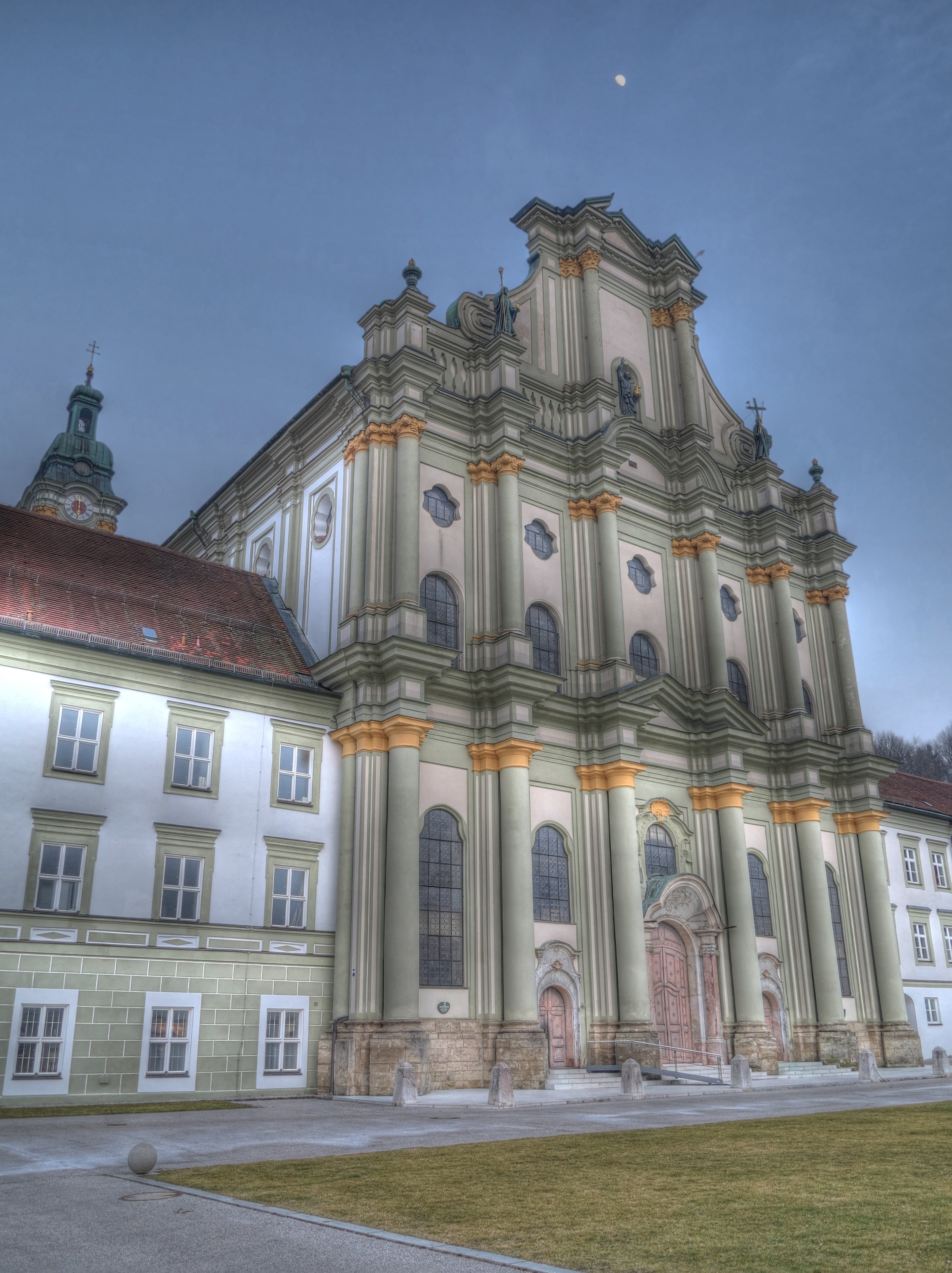 Deutschland, Bayern, Oberbayern, Fürstenfeldbruck, Kloster Fürstenfeld, ehem. Klosterkirche St. Mariä Himmelfahrt (HDR-Bild)